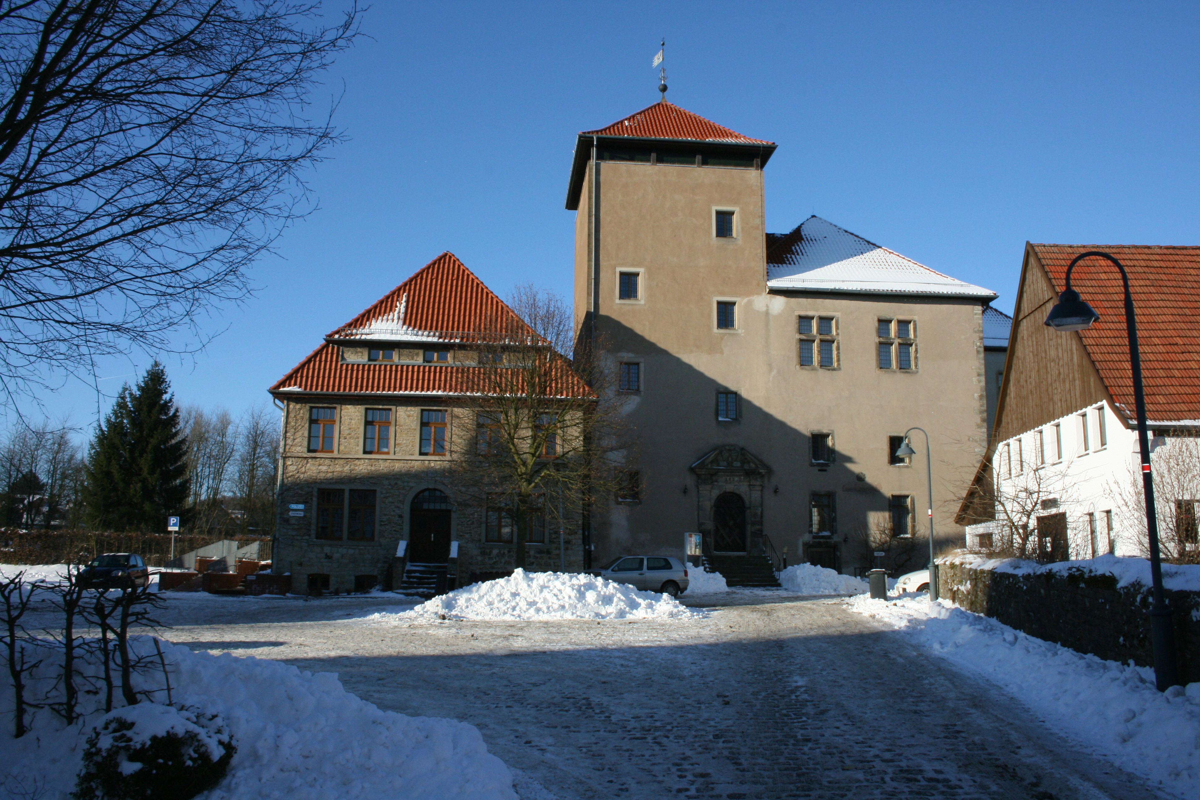 Burg Horn in Horn-Bad Meinberg, Frontseite